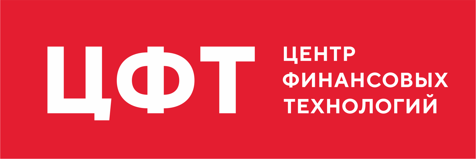 логотип ЦФТ